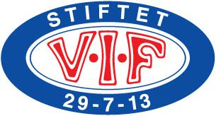 A Vålerenga Fotball logoója